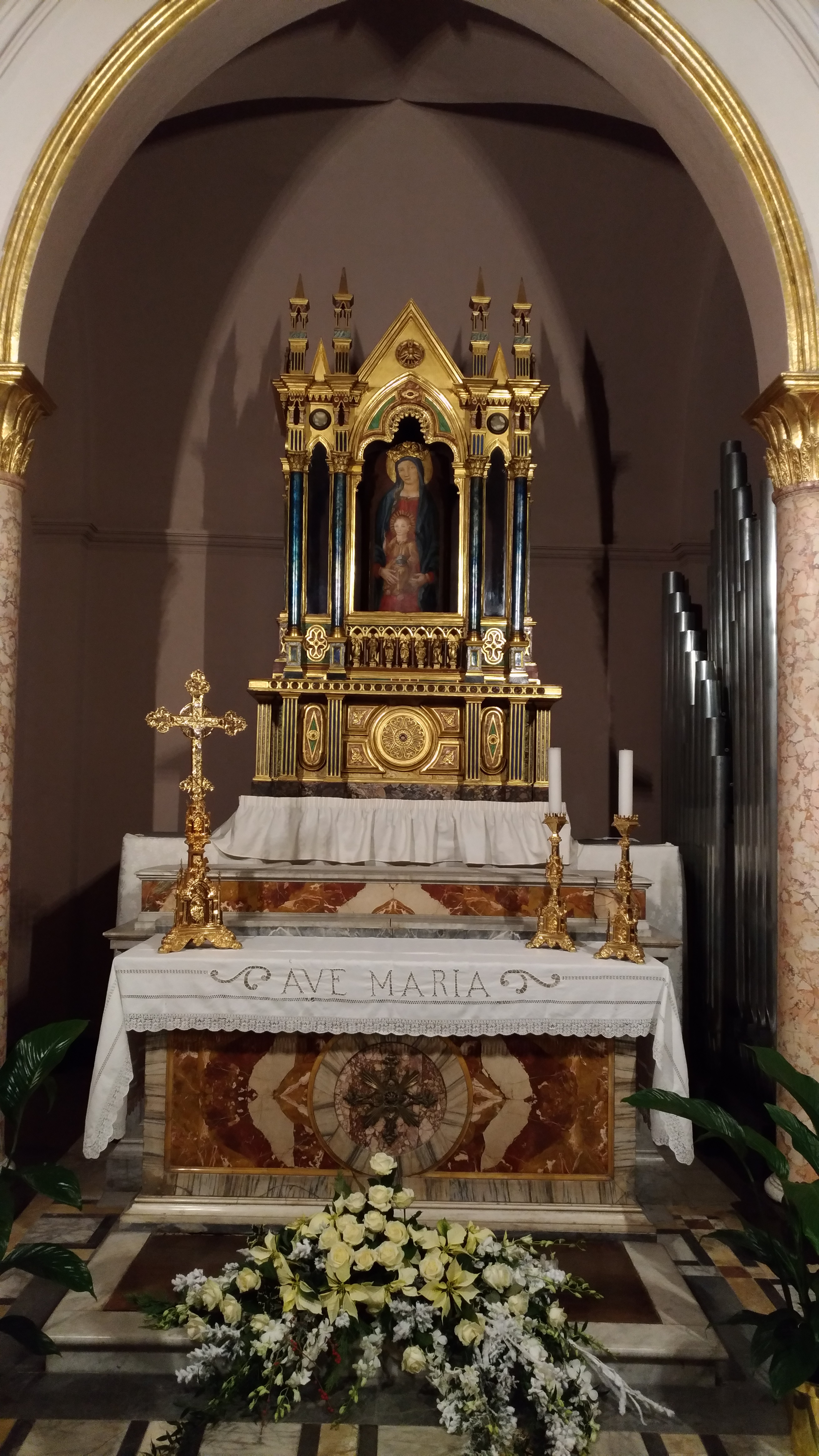 Santa Maria Maggiore (Alatri), cappella della Madonna della Libera